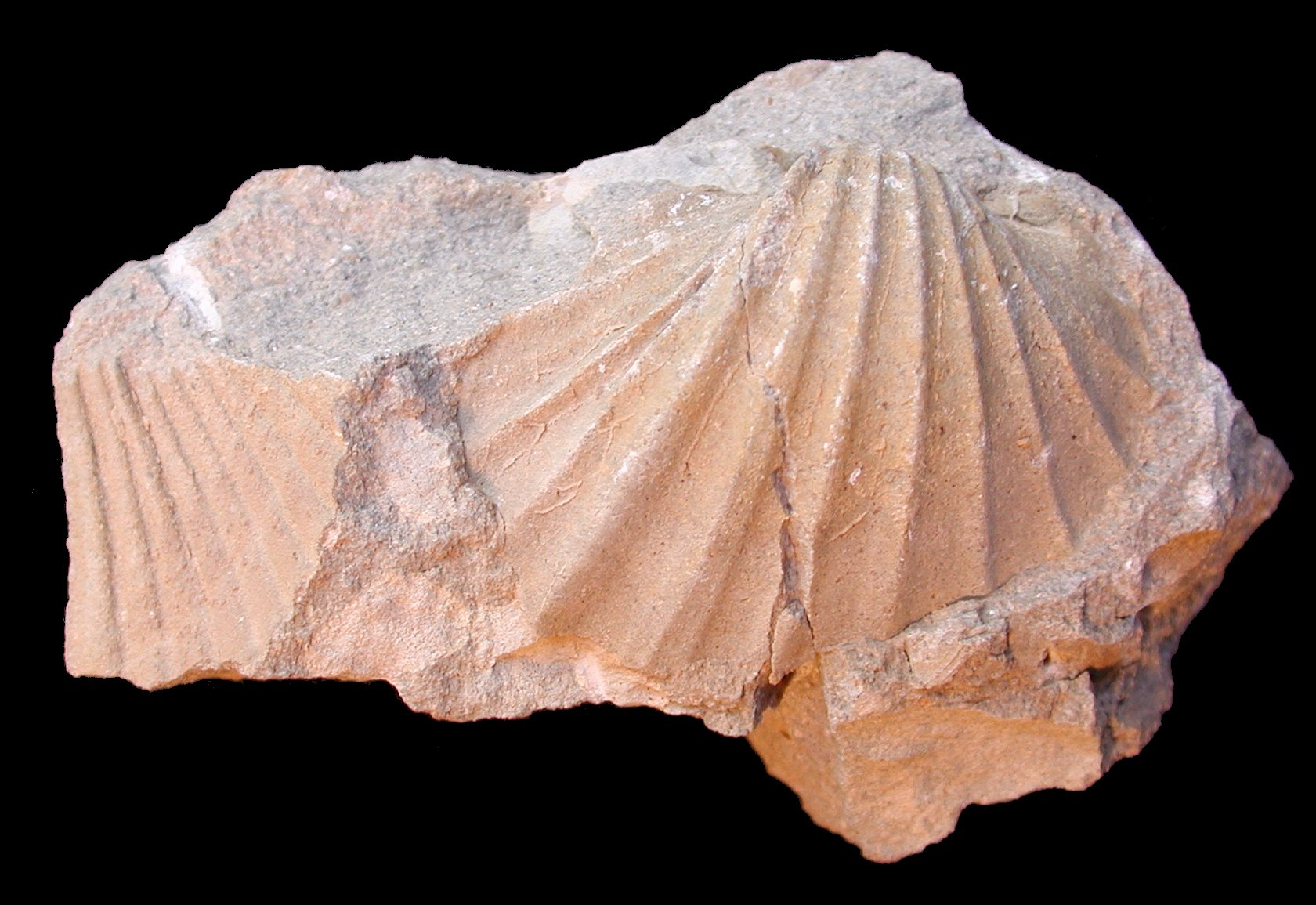 Pliocene bivalve